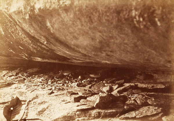 « Cimetière d'Indiens Piaroas. Grotte du Cerro de los Muertos. 24 septembre 1886 » • 1886 Jean Chaffanjon Épreuve sur papier albuminé, 12,2 x 17,6 cm © BnF, département des Cartes et Plans, Société de géographie, Sg Wf 105 (34) Après avoir franchi le raudal, Chaffanjon passe une dizaine de jours au village d'Atures et visite les environs pour rassembler des informations sur les anciennes populations indiennes déjà étudiées par Jules Crevaux en 1880. Le cimetière des Piaroa, situé dans une anfractuosité de la roche du Cerro de los Muertos, retient son attention. Sans beaucoup de scrupules néanmoins, il rapporte une collection importante de crânes et d'objets, ainsi que deux squelettes complets qui seront donnés au musée du Trocadéro.